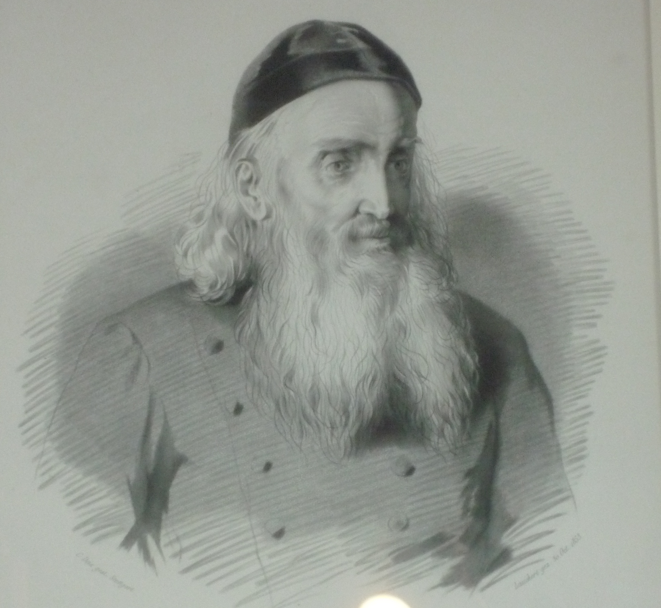 Portrait von Joseph von Laßberg in der Burg Meersburg